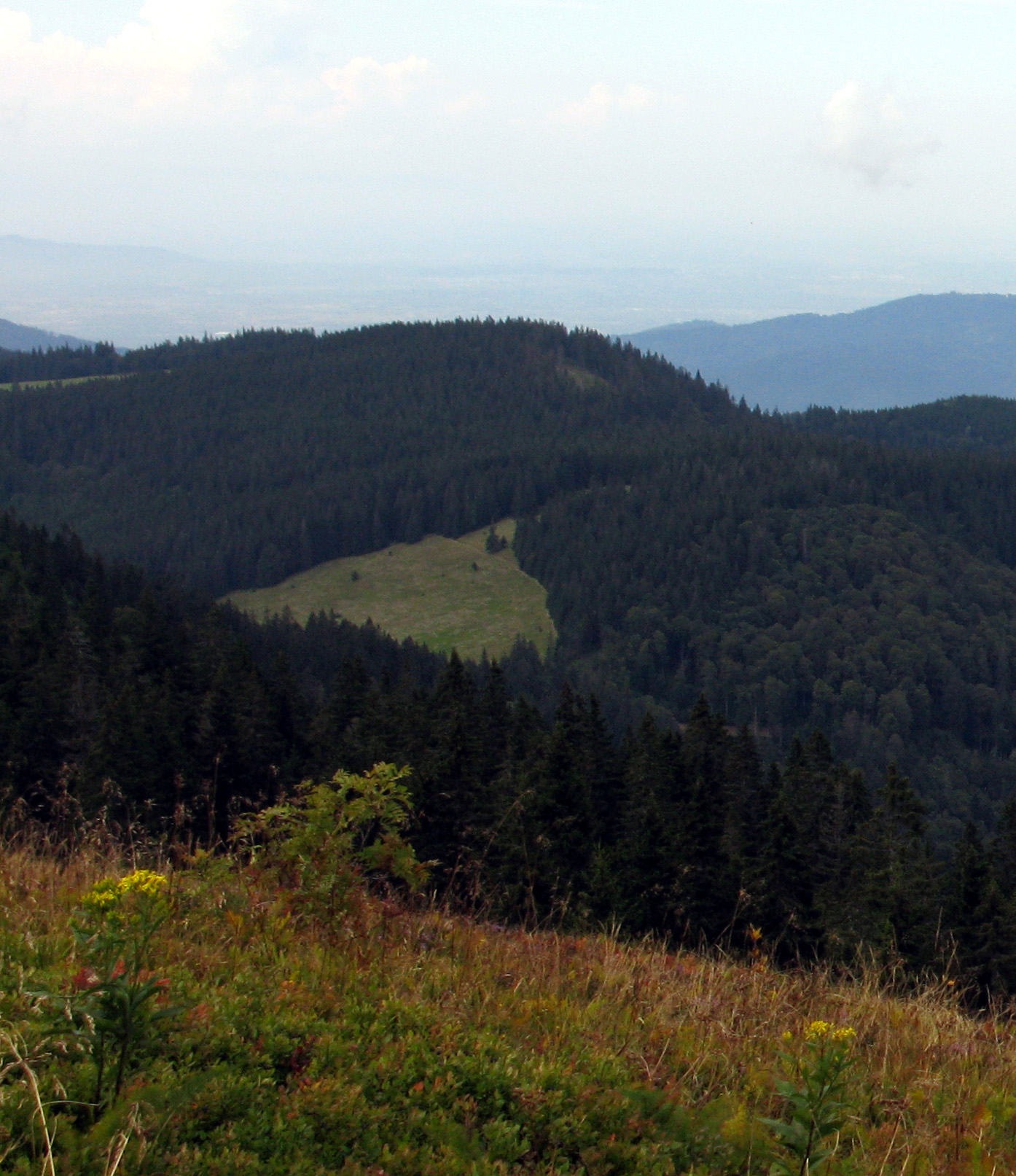 Blick vom Feldberg zum Toten Mann